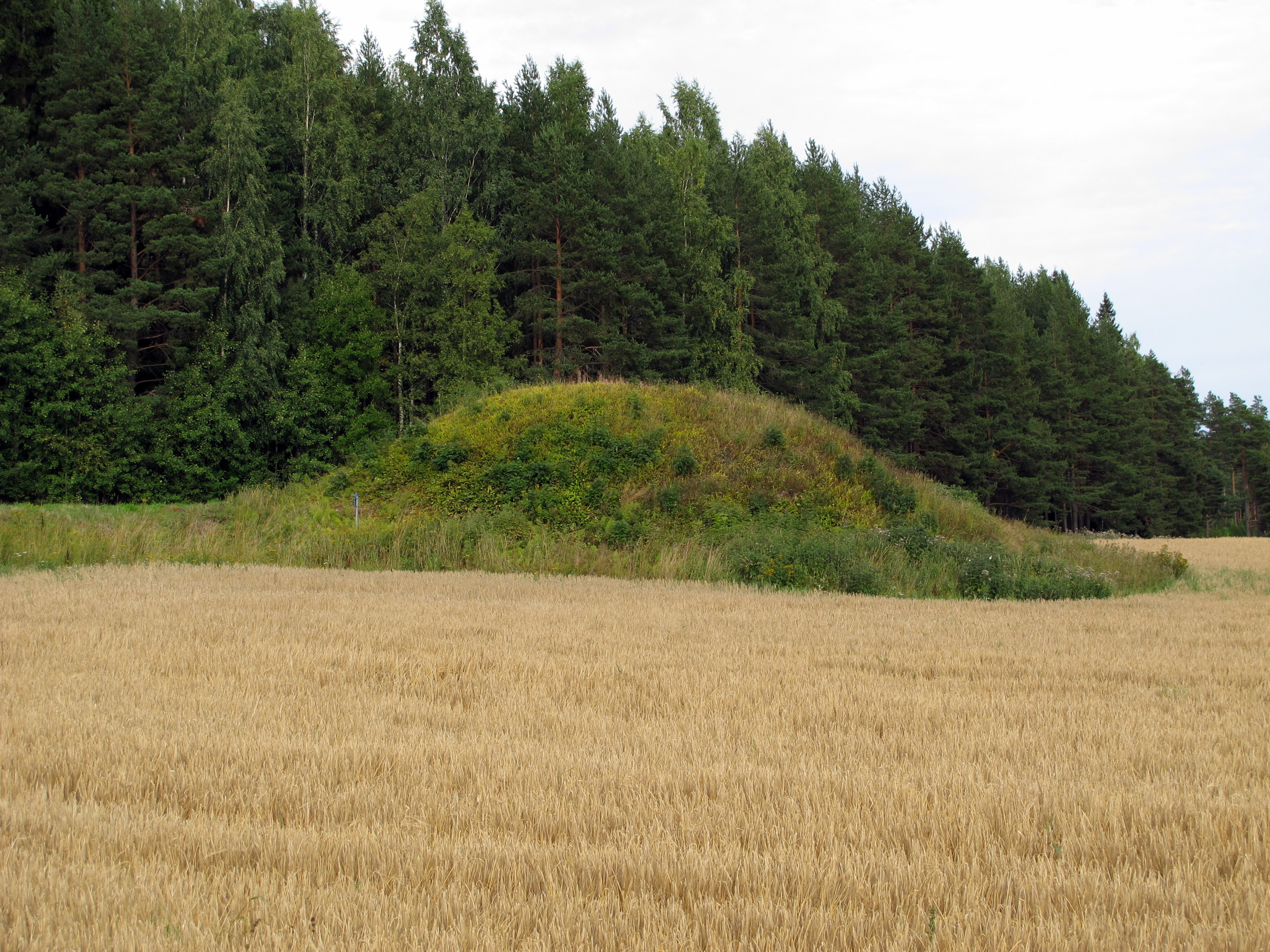 Hög 50:1